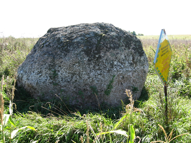 «Будрэвічаў камень» воранаўскі. Рэмзы